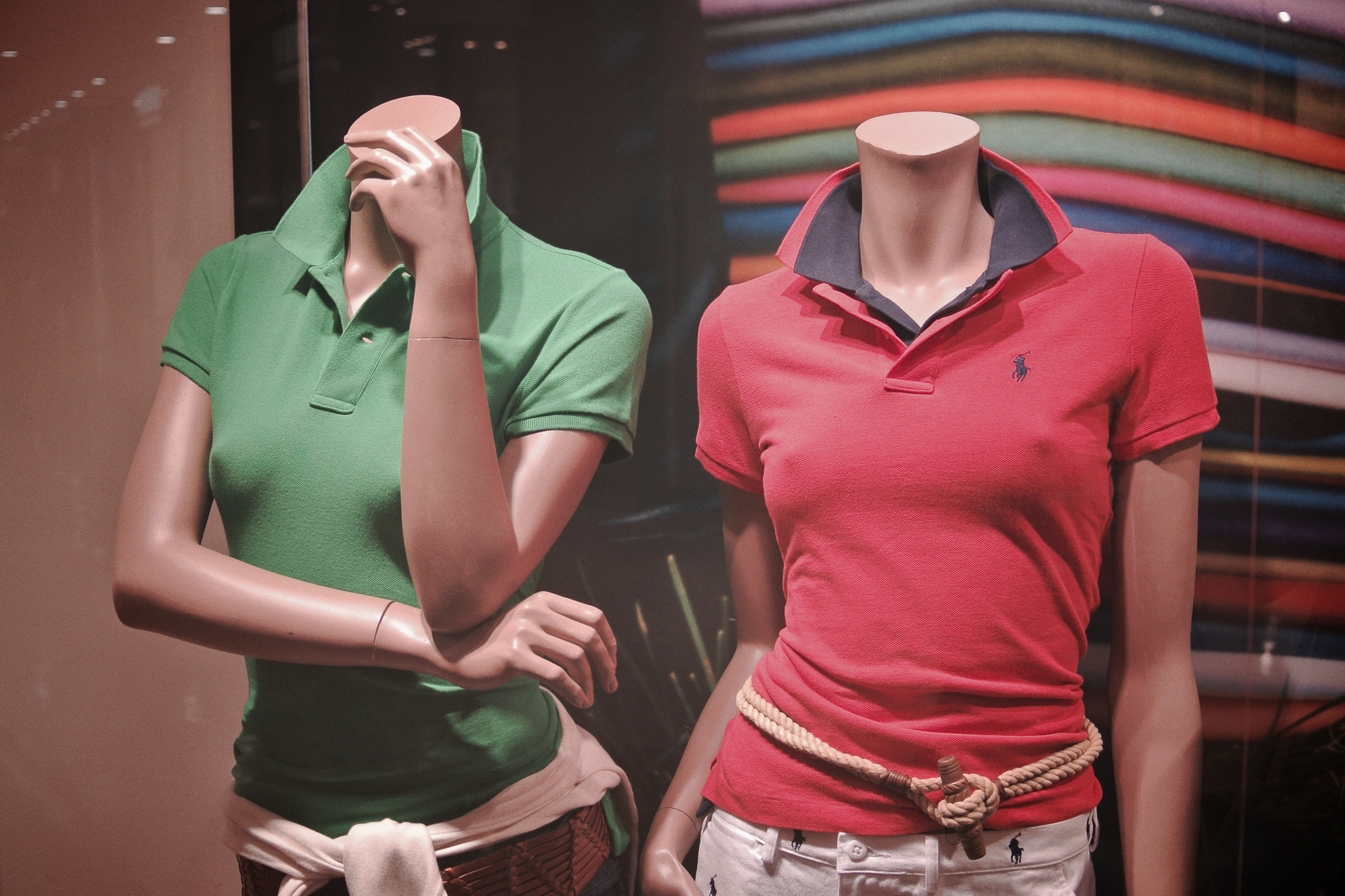 B地区がくっきり。ポロシャツの２枚重ね着には、どうしてもアグリーしかねる。